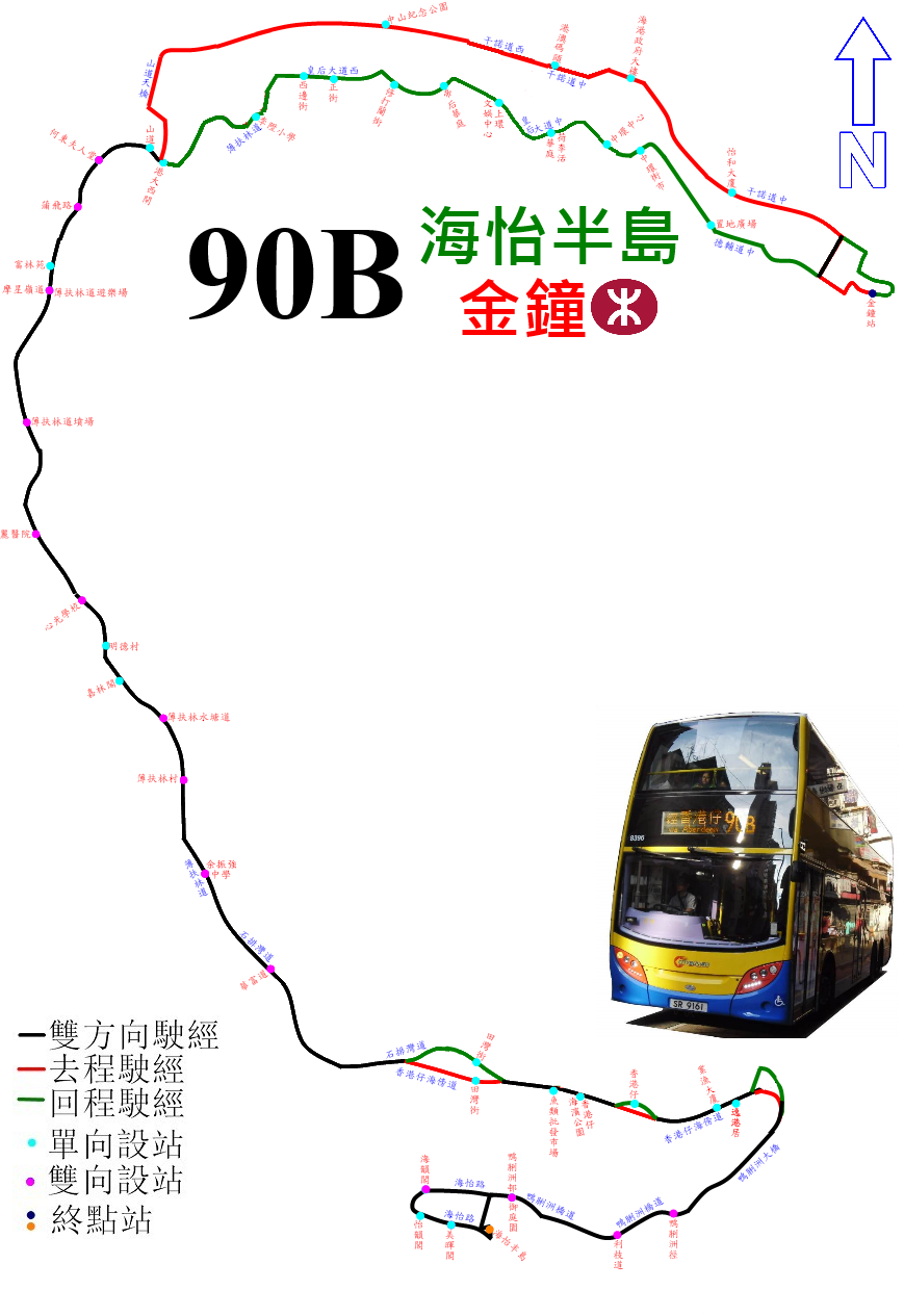 中文（香港）: 城巴90B線的走線圖